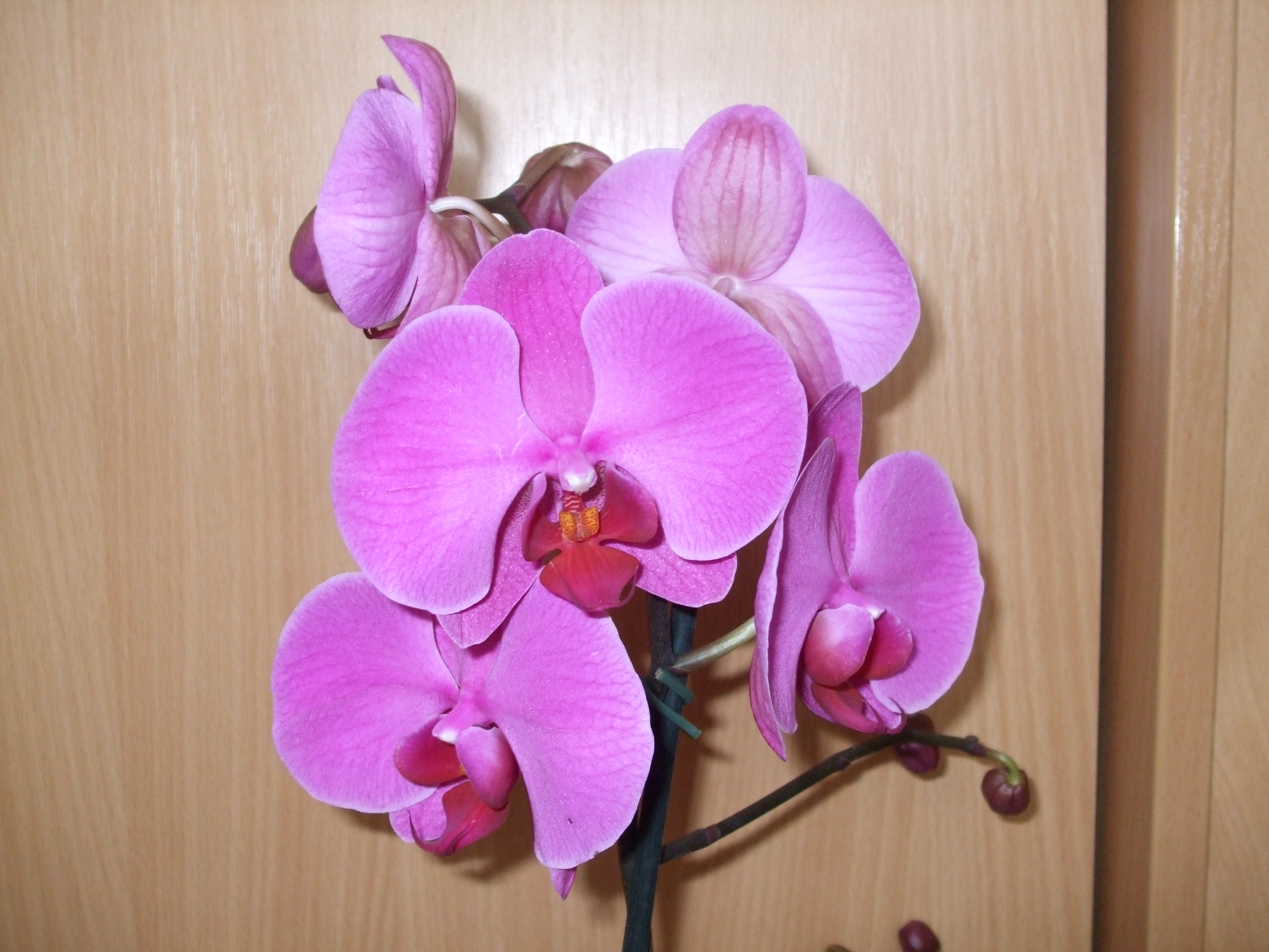 Phalaenopsis